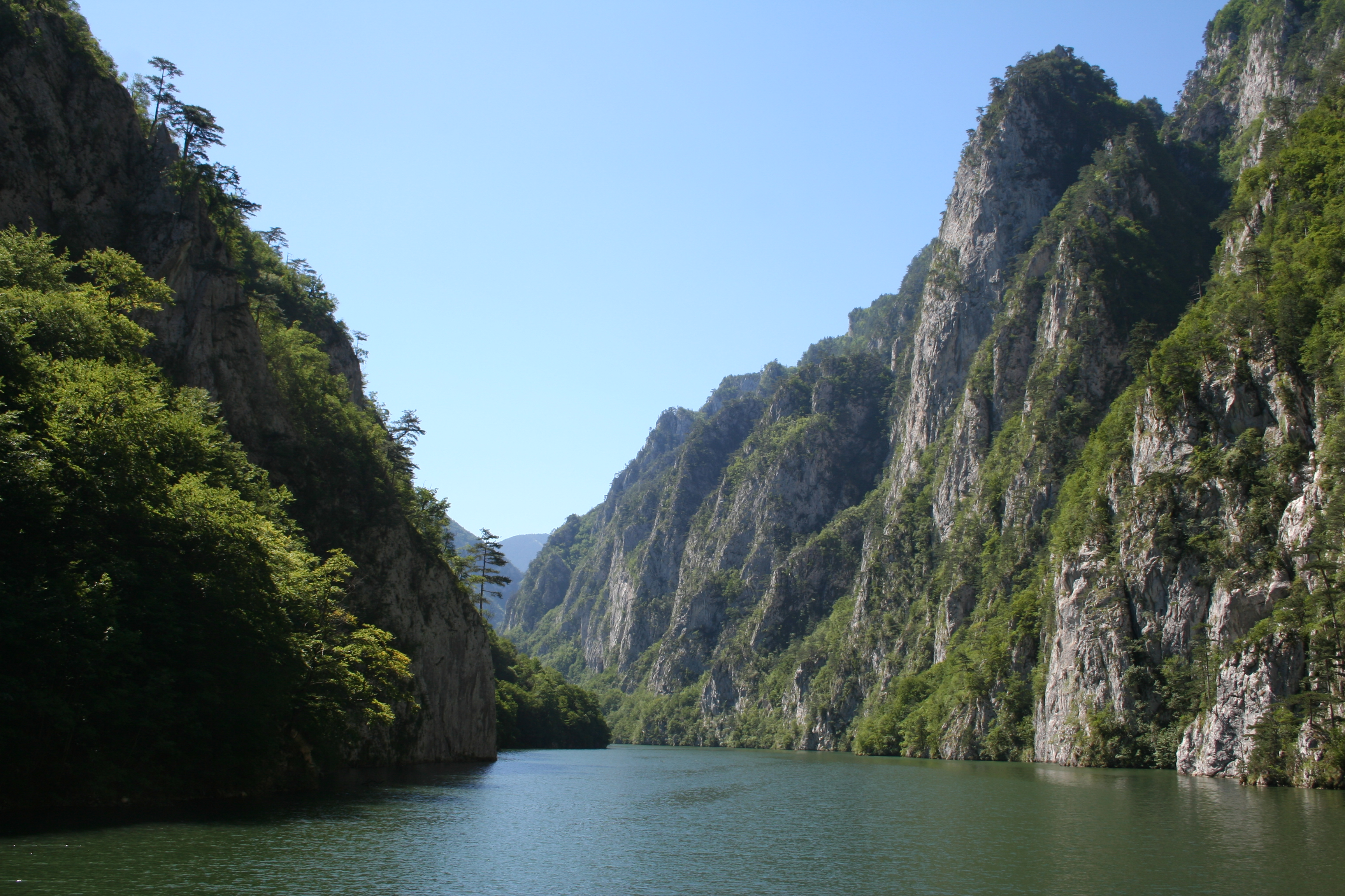 Krstarenje Drinom brodom Glizzly 2, Perućac-Višegrad